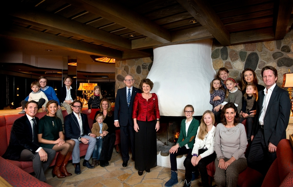 Familiefoto Prinses Margriet. Duitsland, 19 januari 2013: Familiefoto van Prinses Margriet ter gelegenheid van haar 70ste verjaardag. Van links naar rechts: Linksboven: Pieter, Lucas, Samuel, Emma. Rechtsboven: Magali, Prins Floris, Felicia, Prinses Aimée, Eliane, Prins Pieter-Christiaan. Zittend: Prins Maurits, Prinses Marilène, Prins Bernhard, Benjamin, Prinses Annette, prof. mr. Pieter van Vollenhoven, Prinses Margriet, Anna, Isabella, Prinses Anita.